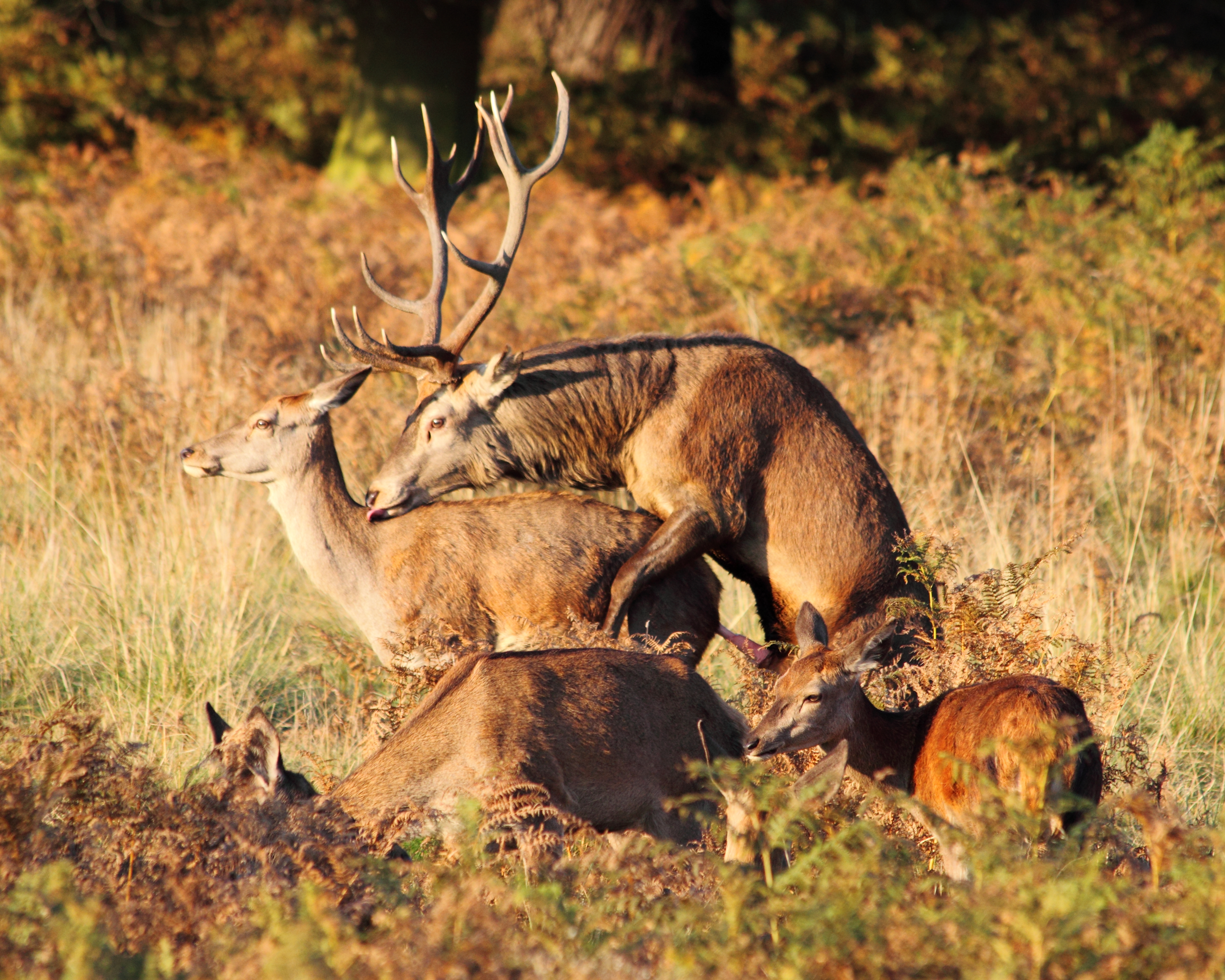 Necking